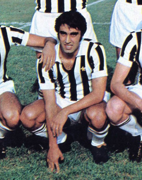 Verona, stadio Marcantonio Bentegodi, 11 ottobre 1970. Il calciatore italiano Pietro Anastasi alla Juventus, prima dell'inizio della sfida sul campo del Verona (0-0) valevole per la 3ª giornata del campionato italiano di Serie A 1970-71.